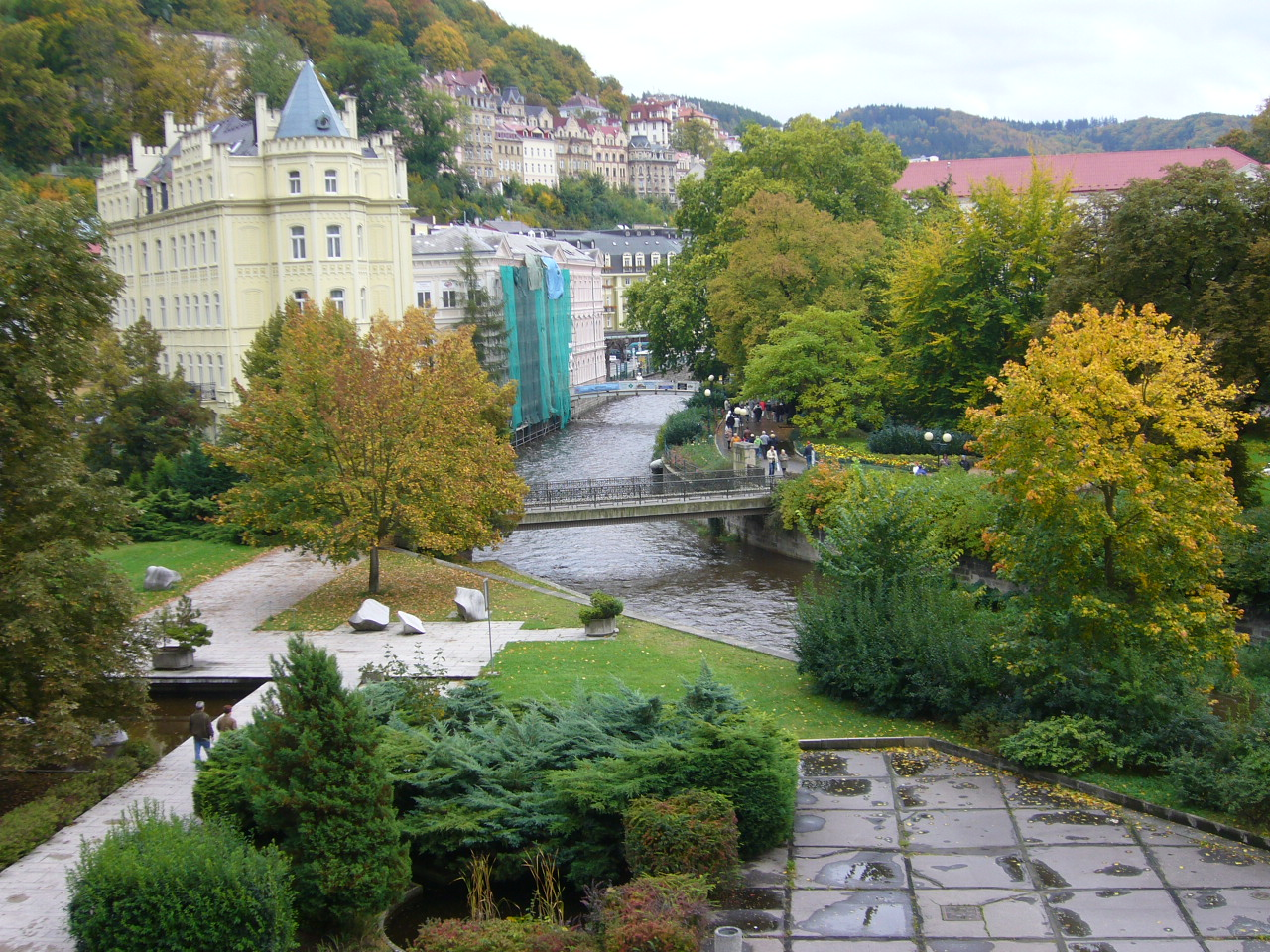 Karlovy Vary (Cidade Balneario), República Checa, Setembro 2007